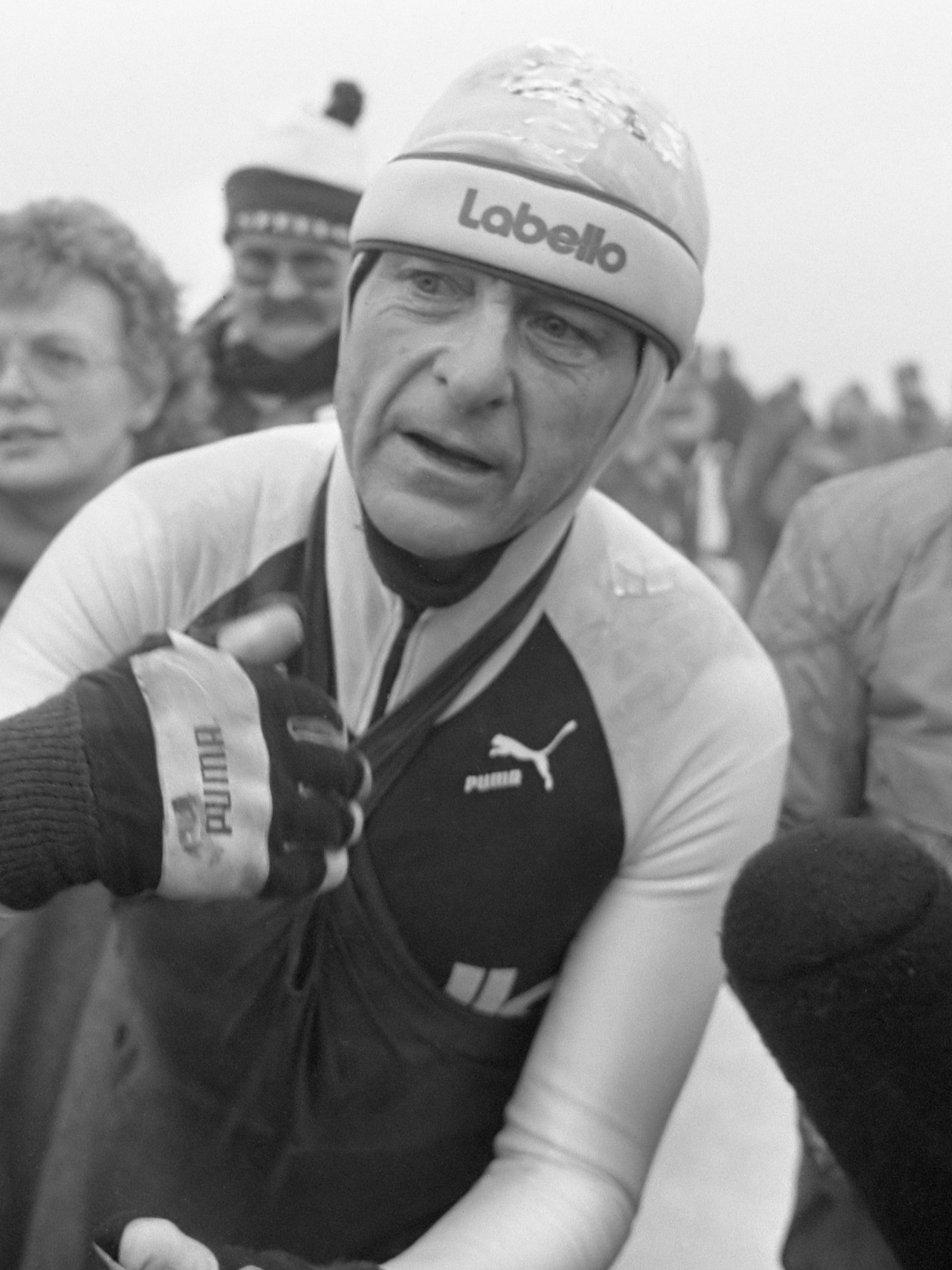 Winnaar Veluwemeertocht Jan Roelof Kruithof na de finish 21 januari 1987